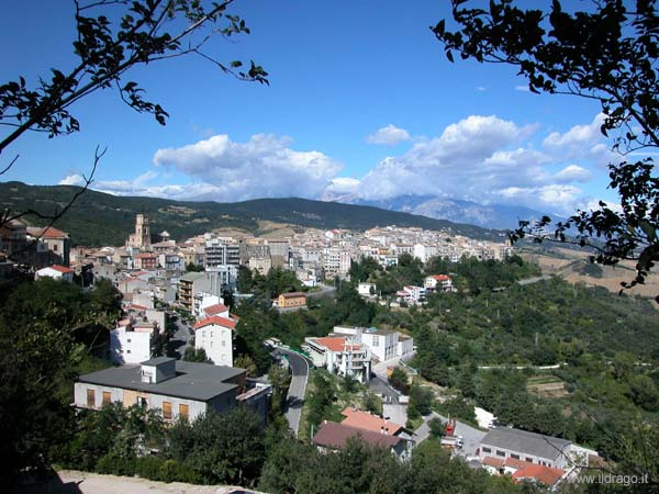 foto di atessa scattata da Annunziato Finoli